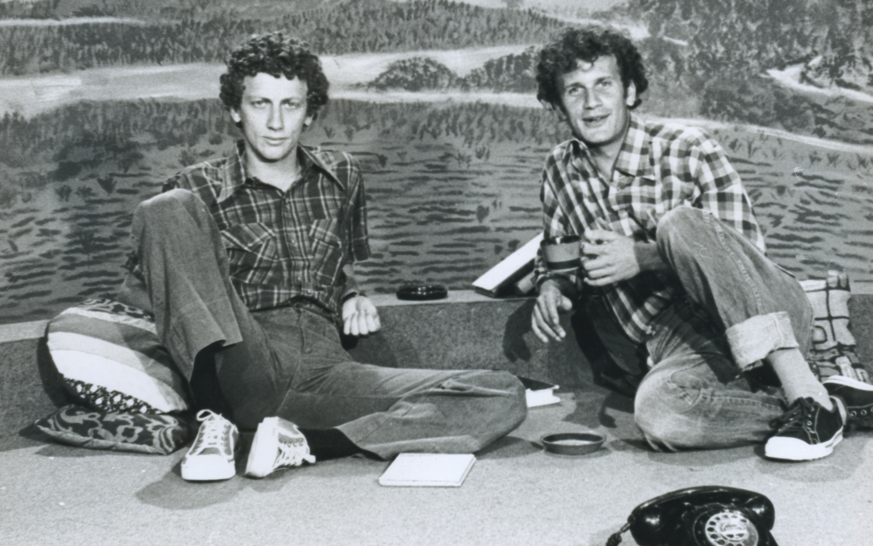 מנחי התוכנית זהו זה! השנים הראשונות מוני מושונוב ודליק ווליניץ